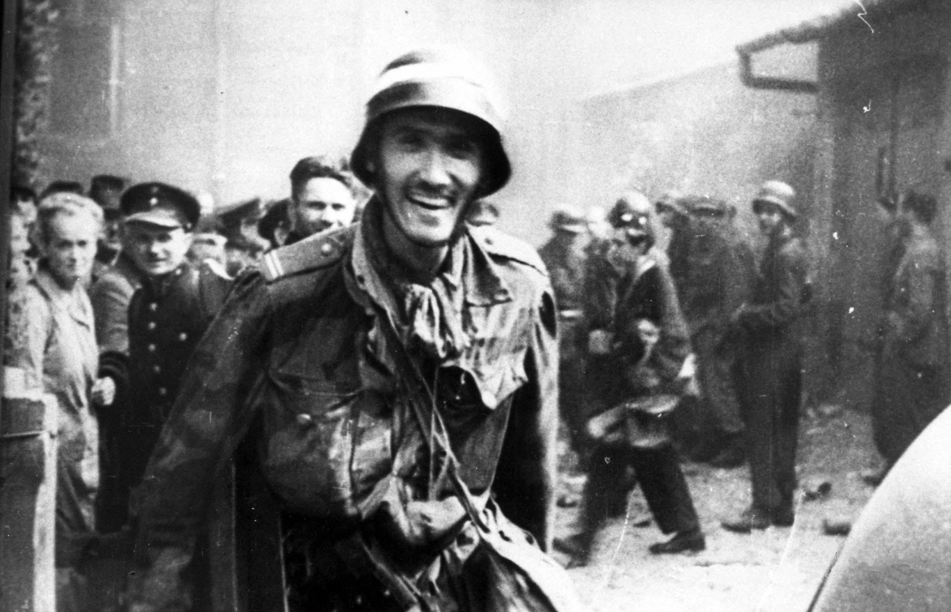 Witold Kieżun po zdobyciu Komendy Głównej Policji (przy Krakowskim Przedmieściu 1) podczas powstania warszawskiego 1944, zdjęcie filmowe.